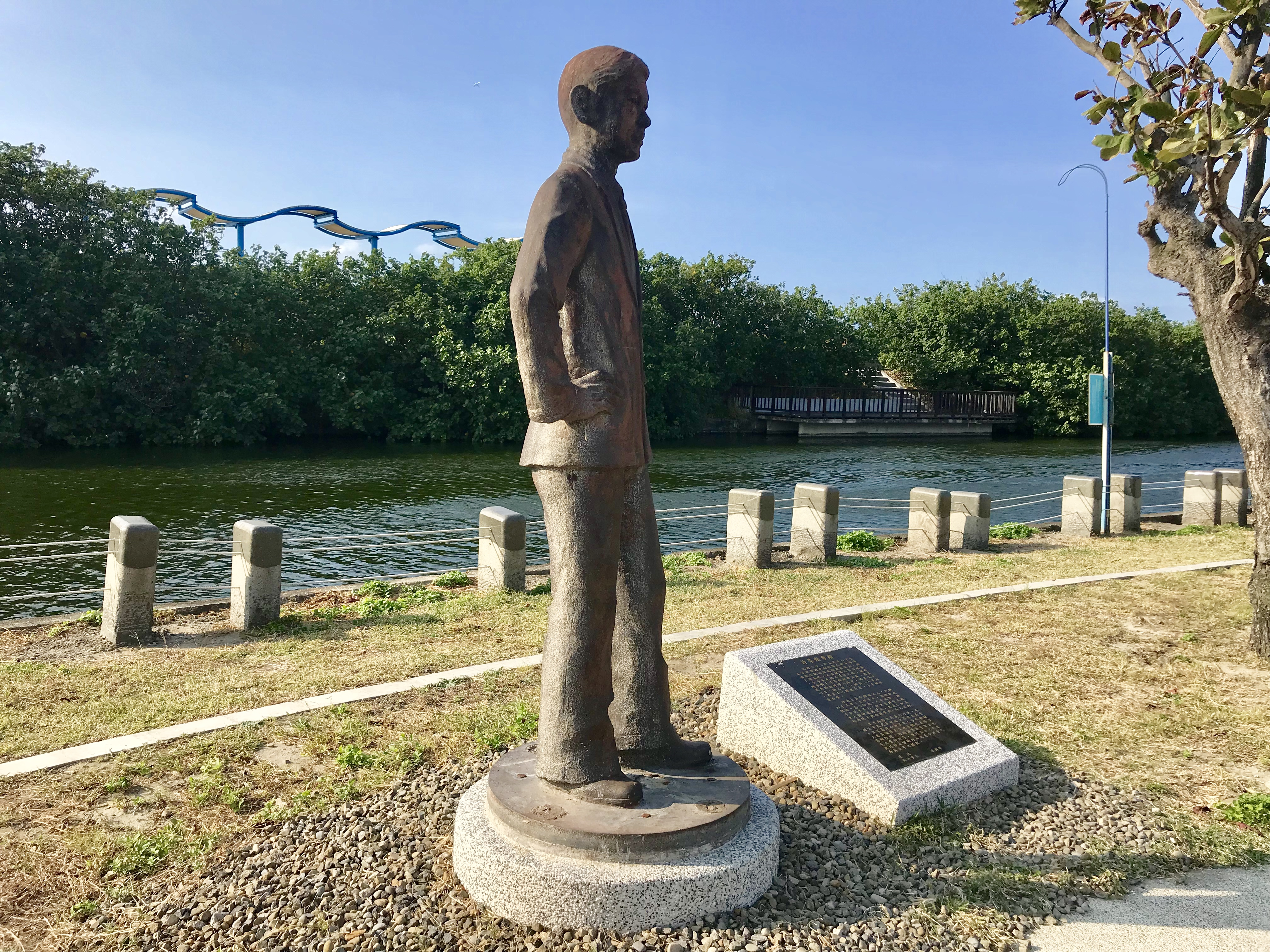 中文（台灣）: 港南濱海風景區的許榮燦銅像